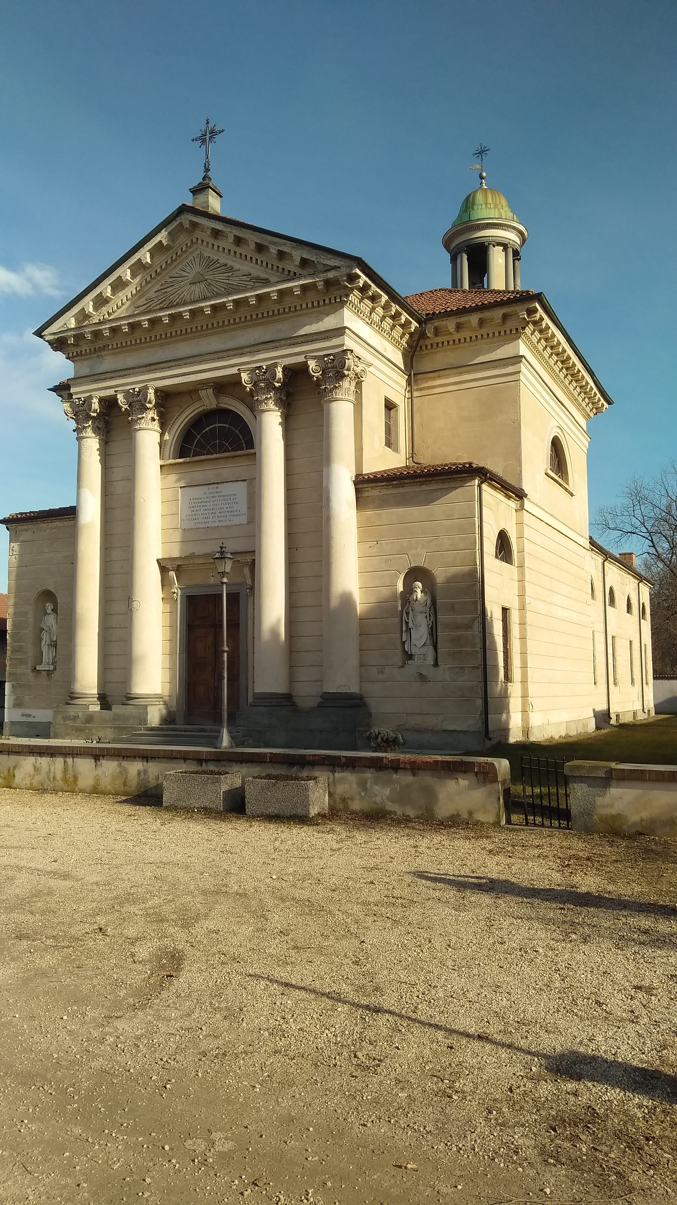 Borgo Cornalese (Villastellone): la chiesa della Madonna dei dolori (arch. Brunati)